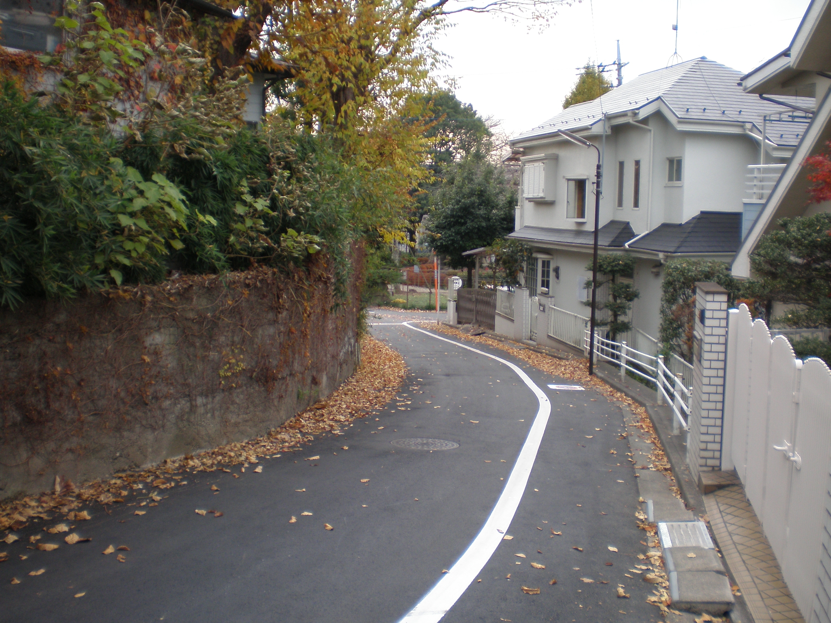 Kanashî Saka in Fuchu, Tokyo.